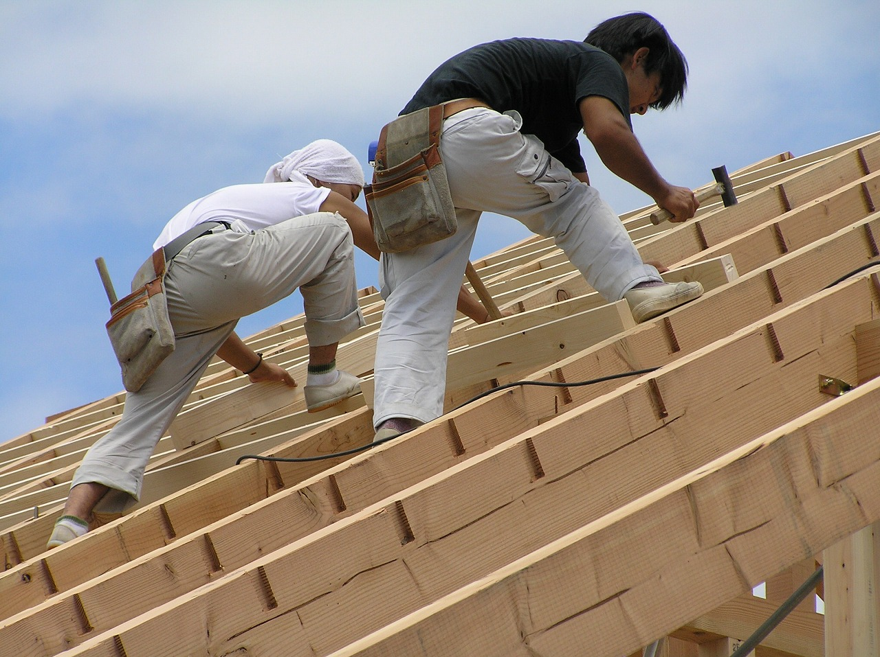 大工と屋根の垂木構造